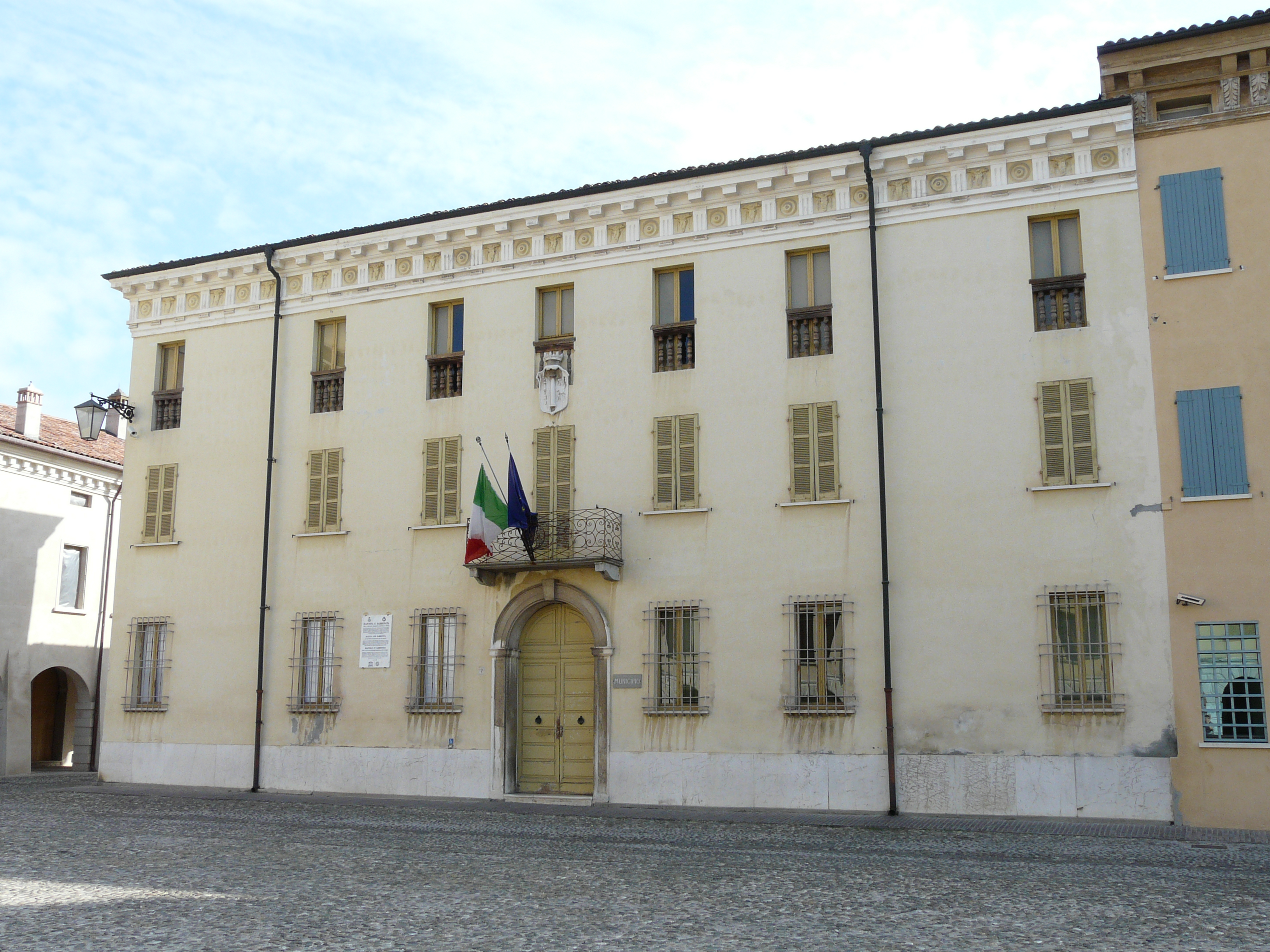 Municipio di Sabbioneta, Lombardia, Italia